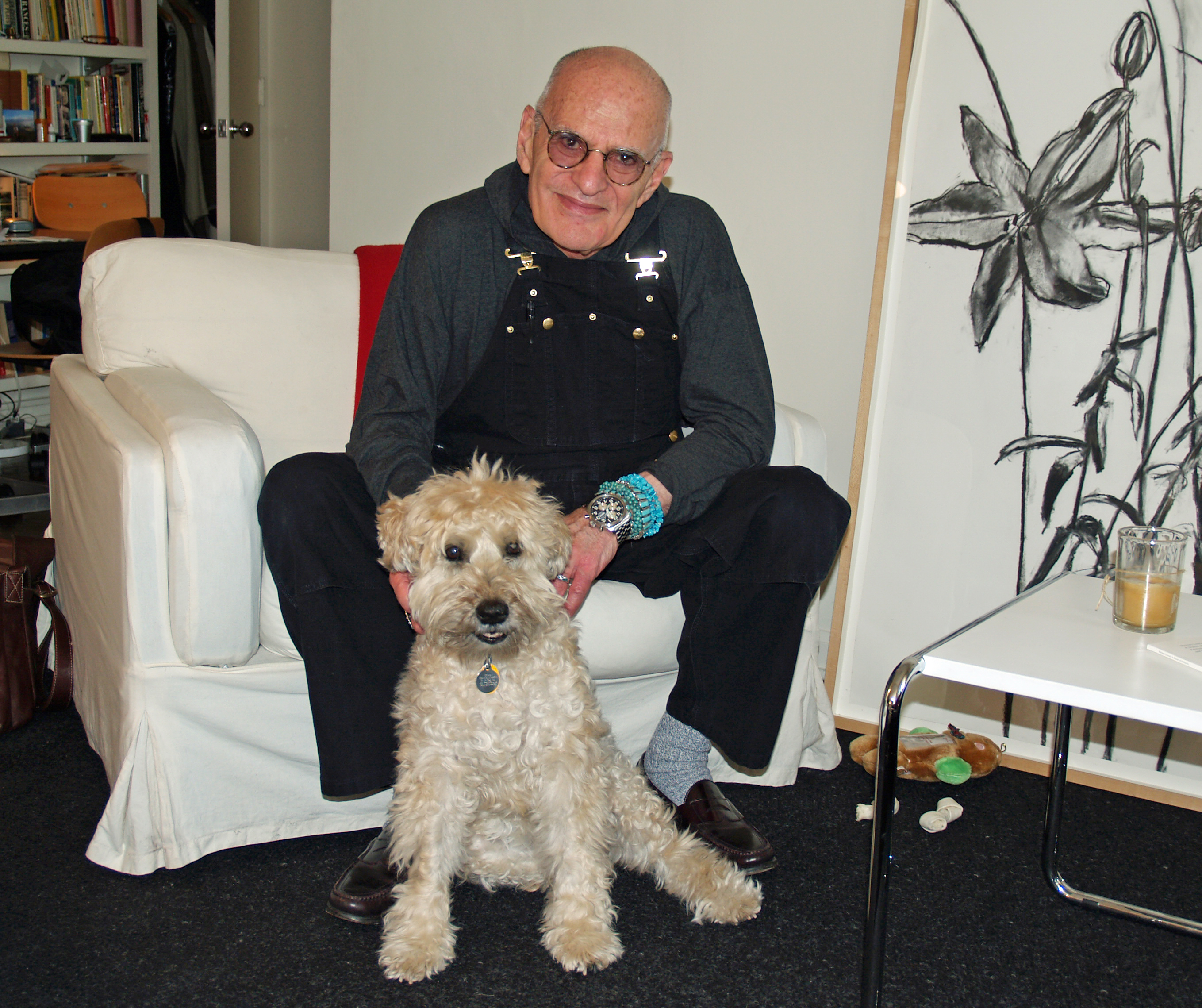 Larry Kramer spring 5 by David Shankbone